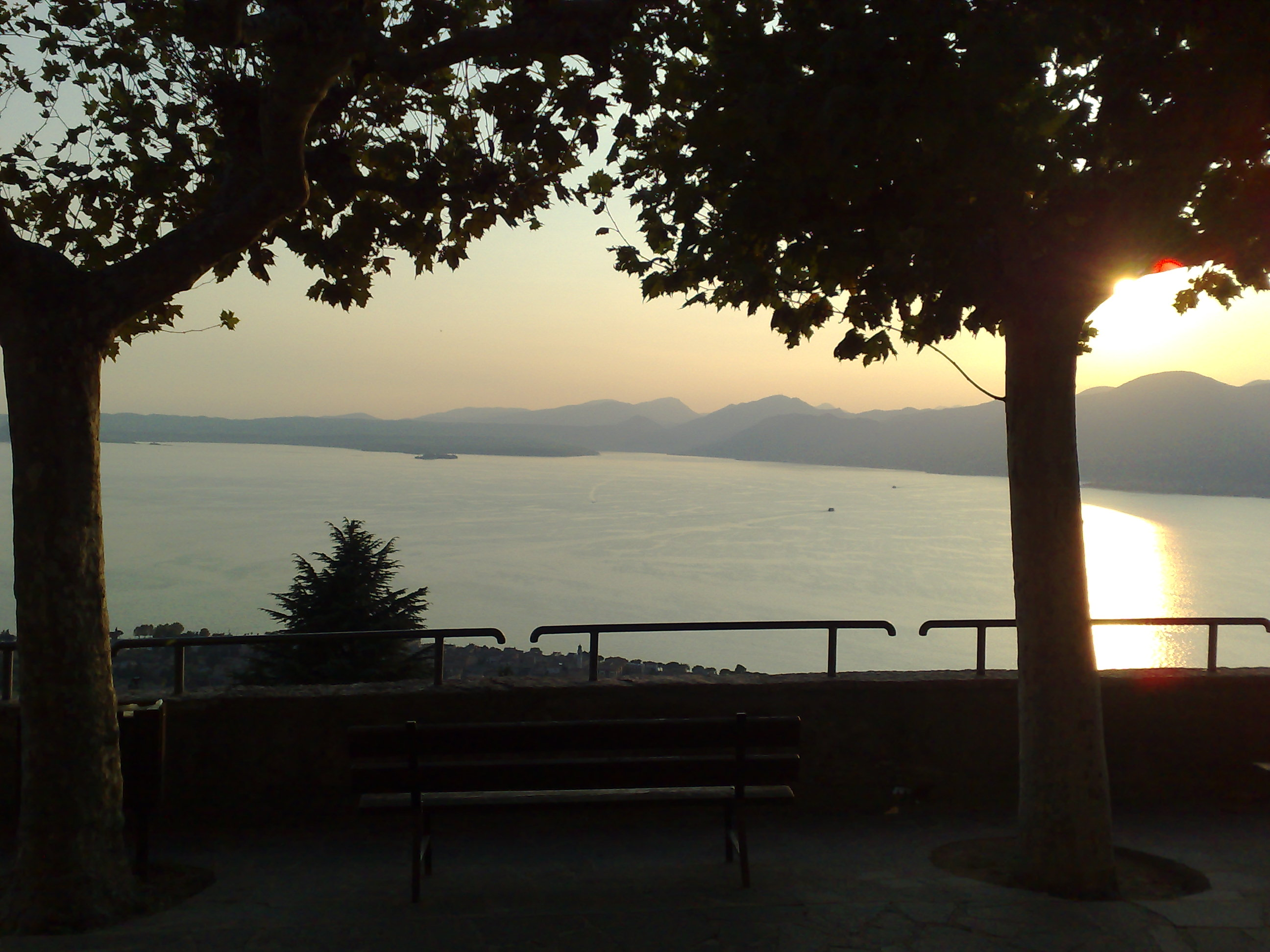 Panchina rivolta verso il lago di Garda. Veduta dall'alto del lago.